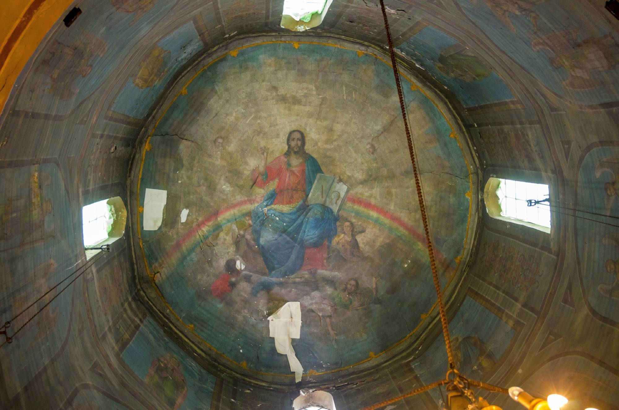 Pantocrator de pe cupola naosului bisericii din Puchenii Mari